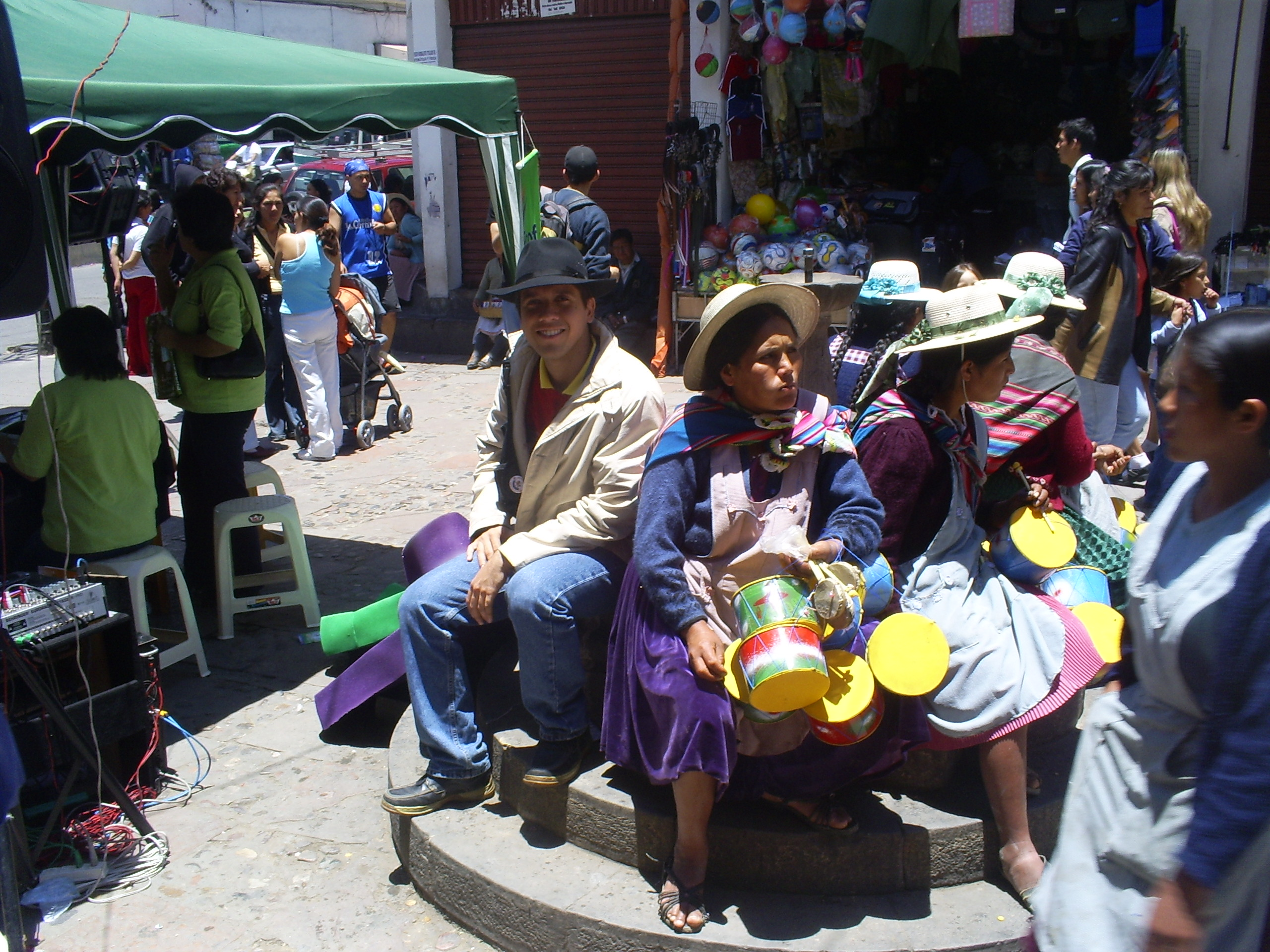 Vista de uno de los mercados de la Ciudad de La Paz